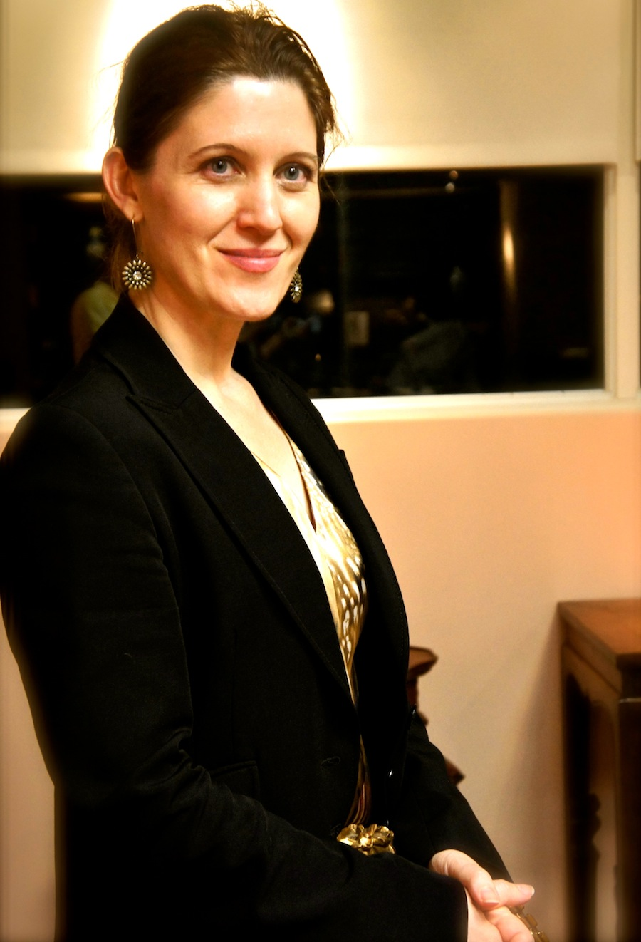 Ivanova, Taipei 2013